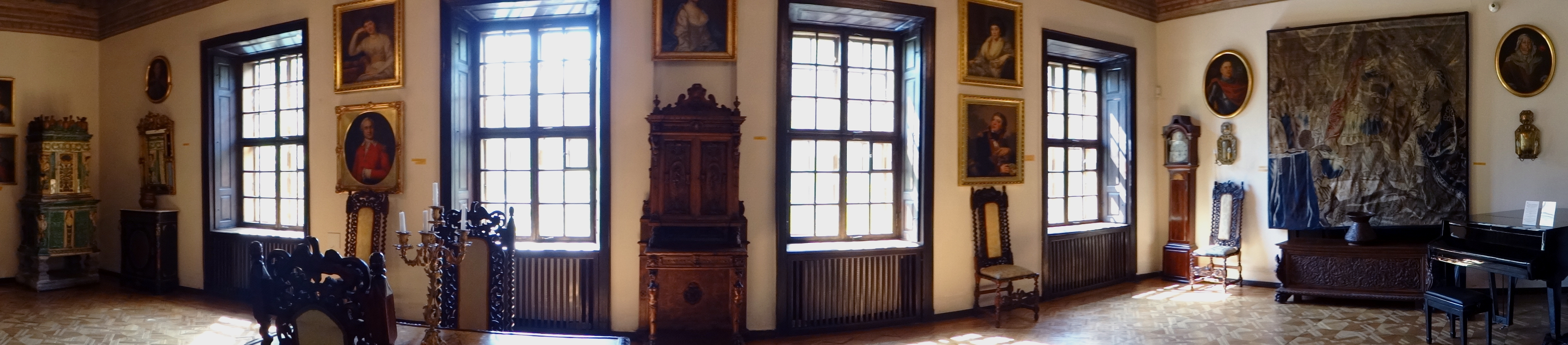 Oporów, zamek, 1434-1449, 1657, 1962-65